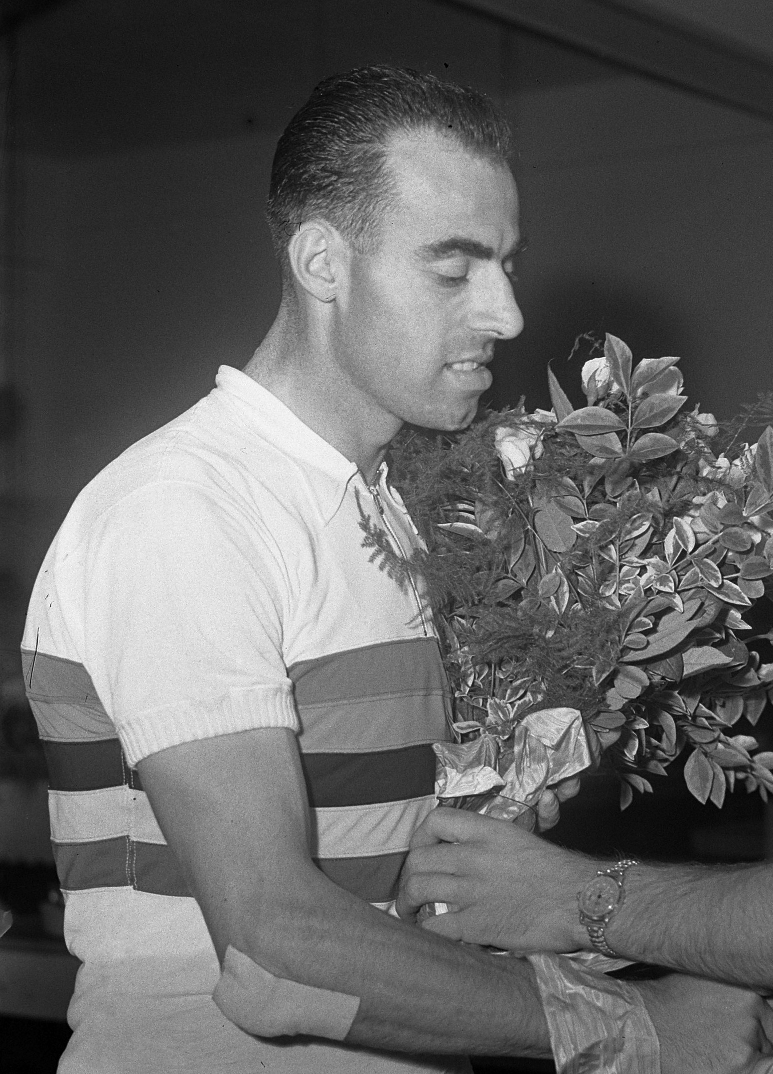 Wielrennen Olympisch stadion. Links Antonio Bevilacqua Italië), wereldkampioen achtervolging 1950. Rechts Wim van Est, die tweede werd.